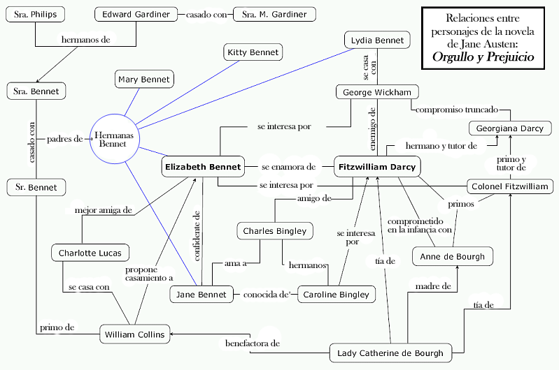 Traducción al español de la tabla de relaciones de personajes de la novela de Jane Austen, Orgullo y Prejuicio.